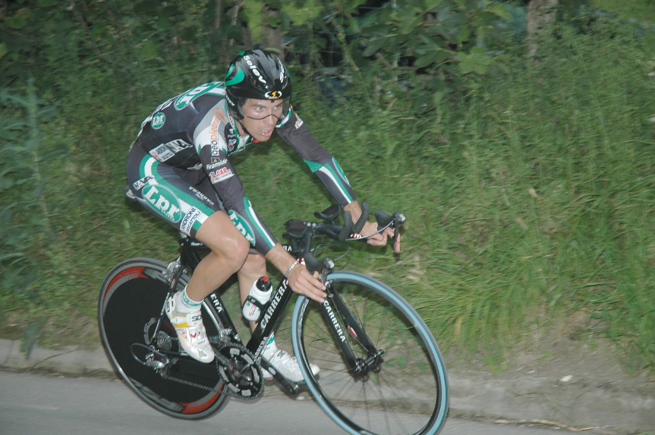 Marco Marcato, Euskal Bizikleta 2007